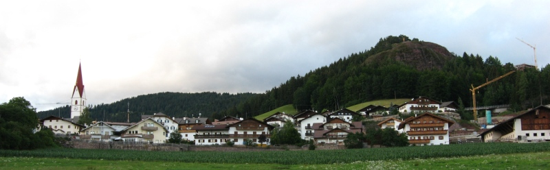 Voeran Dorf